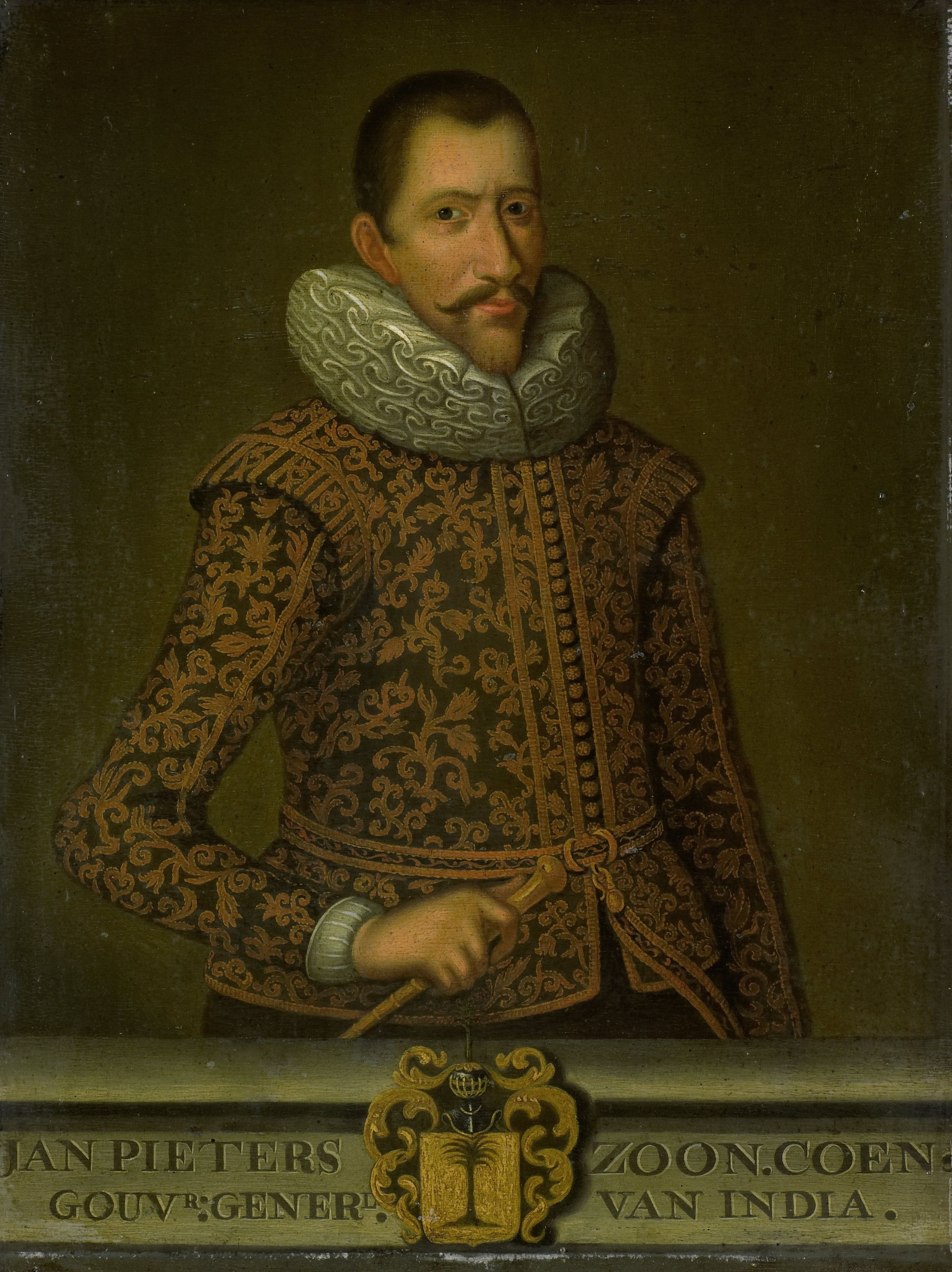 Portrait of Jan Pieterszoon Coen (1587-1629)